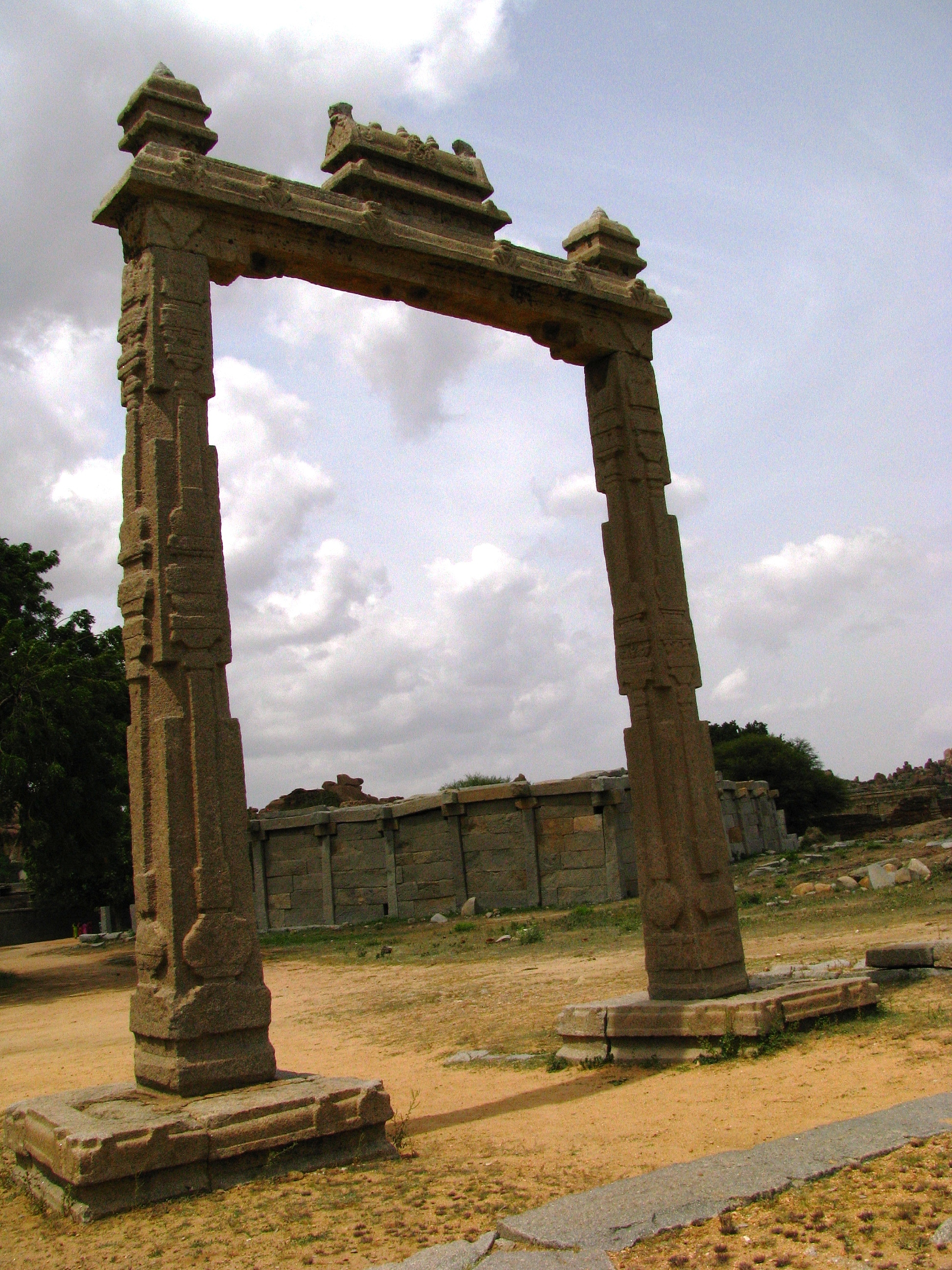 Kings Balance, Hampi, India